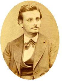 Maxime Vuillaume (1844-1925)